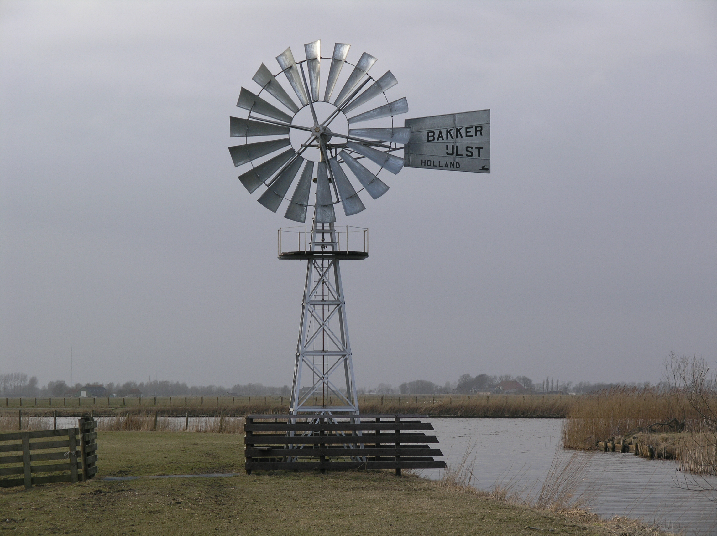 Deinum Windmotor Van der Meer